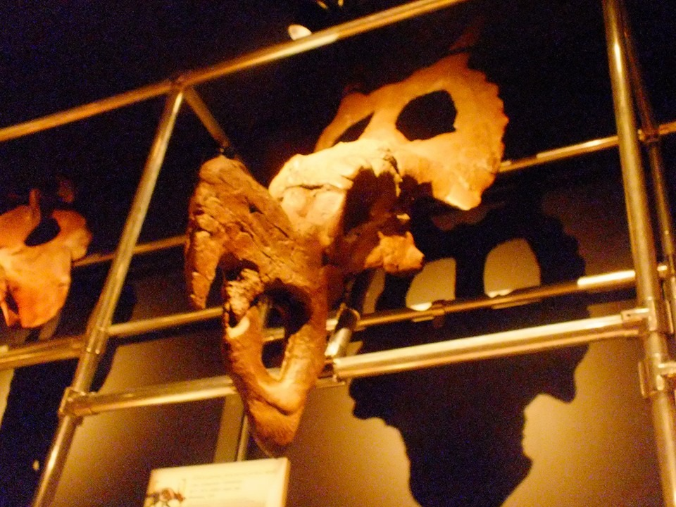 エイニオサウルス頭骨